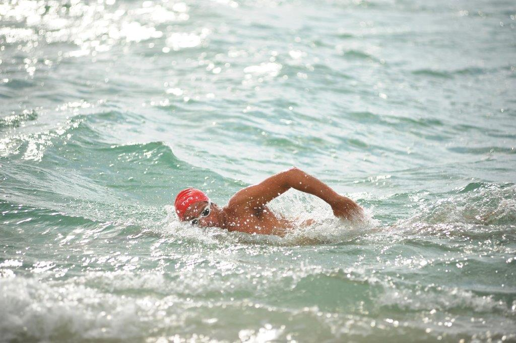 במשחה לזכר בתו, גיא כהן שחה 24 שעות רצופות בזמן של 02.06.2016